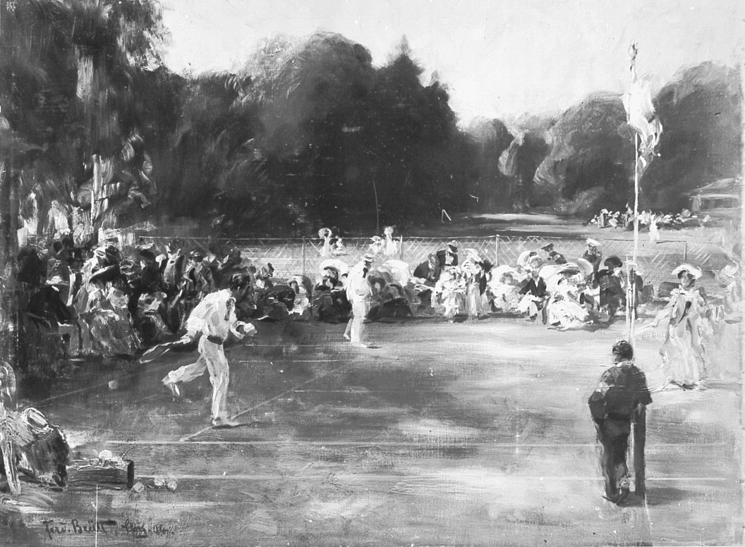 Tennisturnier in Bad Homburg vor der Höhe